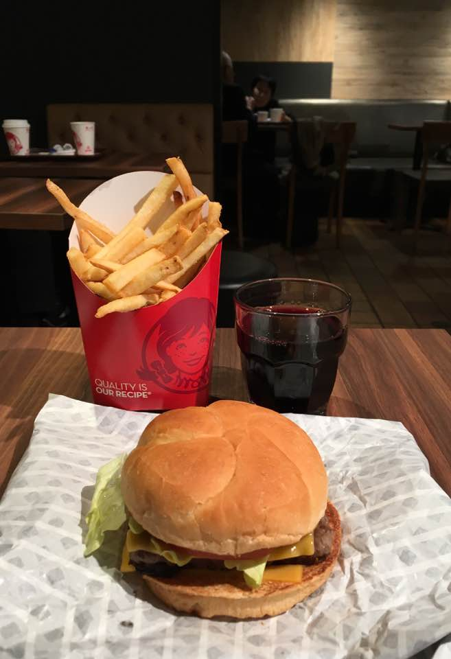 ウェンディーズのメニューの一例